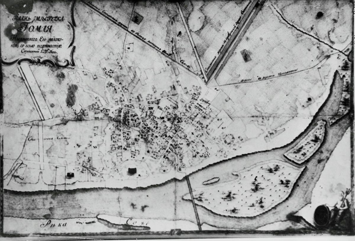 Беларуская (тарашкевіца): Гомель (Homiel). Плян мястэчка